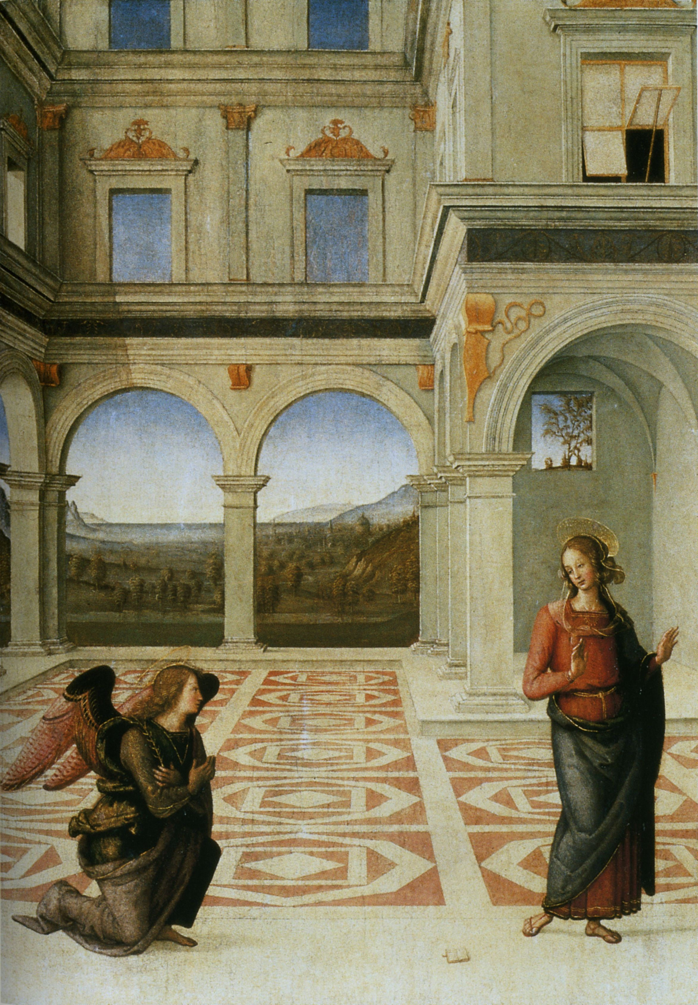 Pietro Perugino: Annunciazione. Cat. no. 47 in Vittoria Garibaldi: Perugino. Catalogo completo. Octavo, Firenze 2000, ISBN 88-8030-091-1